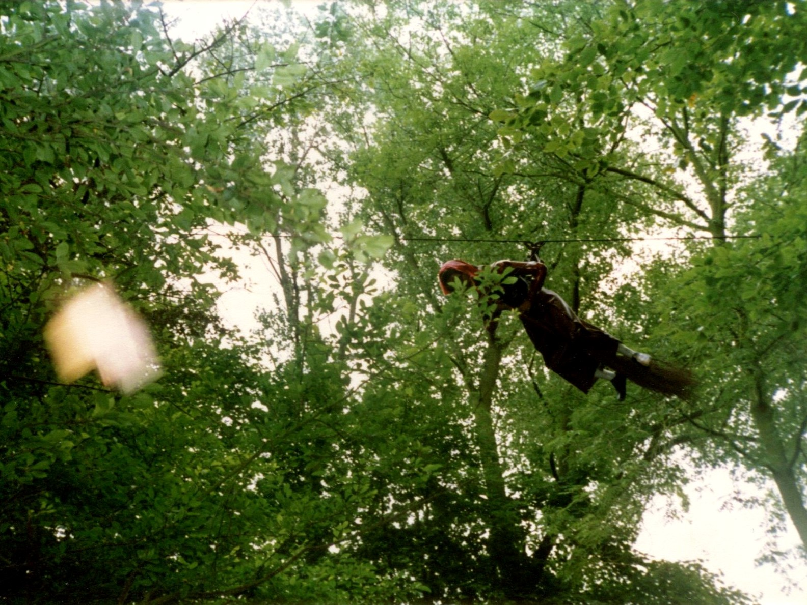 MeliparkPaysContes